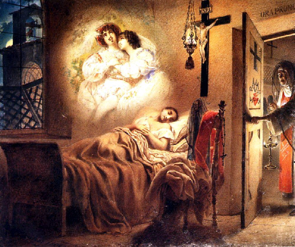 сон монашенки